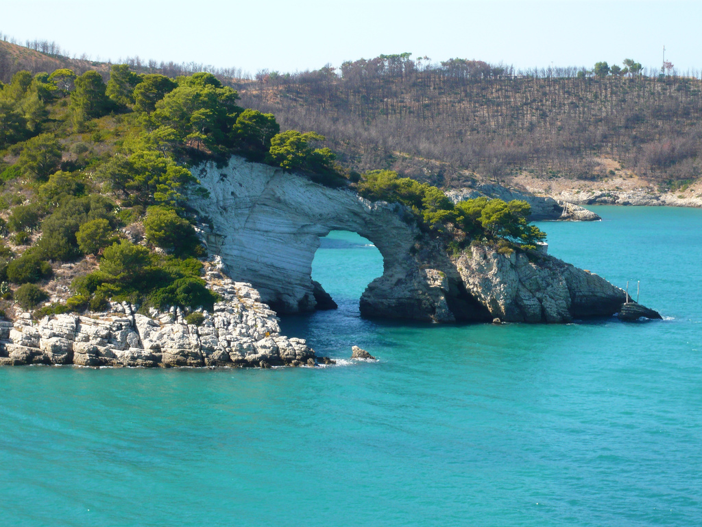 Vista sul gargano